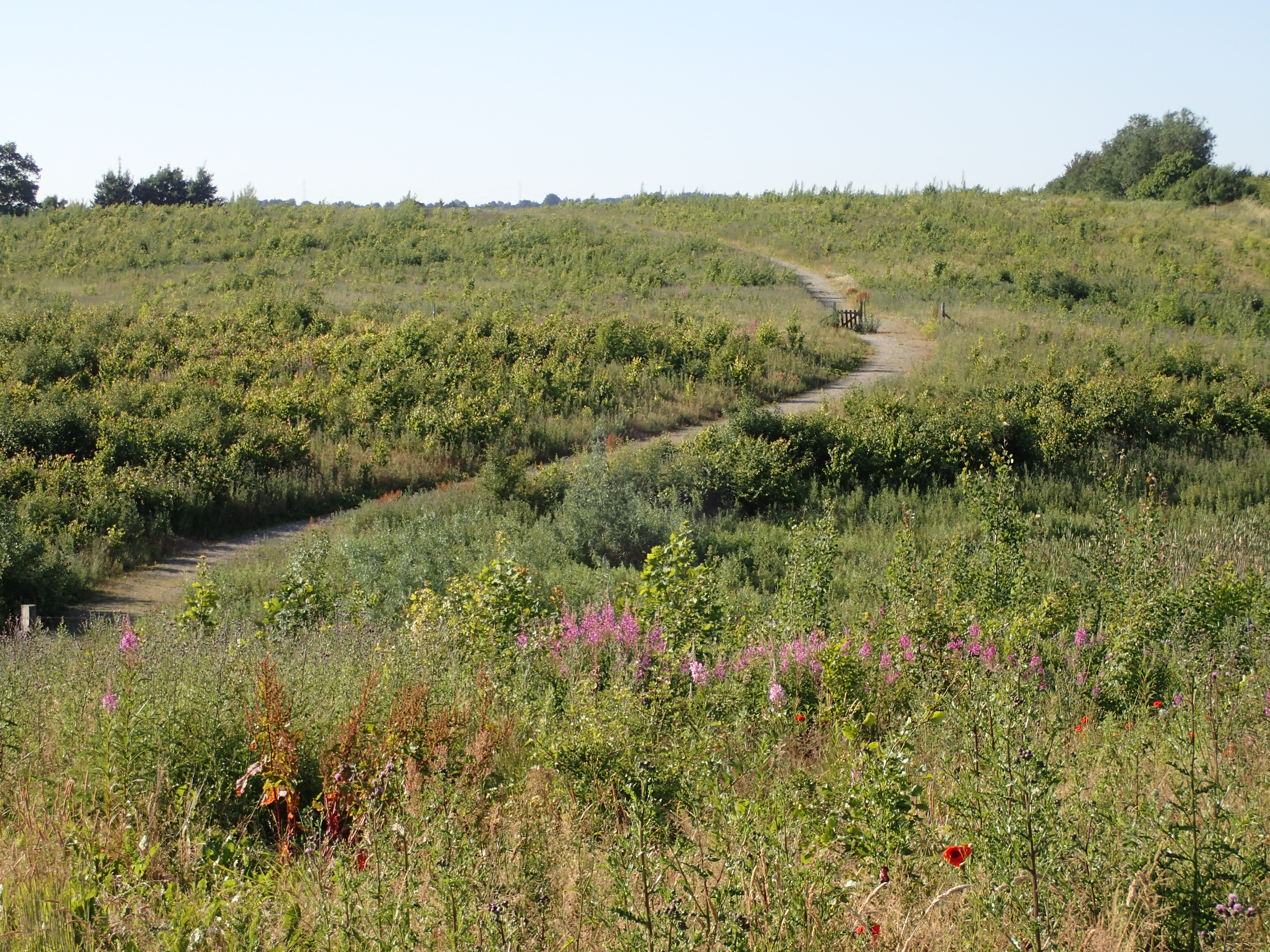 Åbo Skov. Kik mod nord tværs over dalstrøget der løber øst-vest.